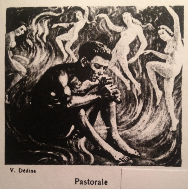 Pastorale de Venceslas Dedina